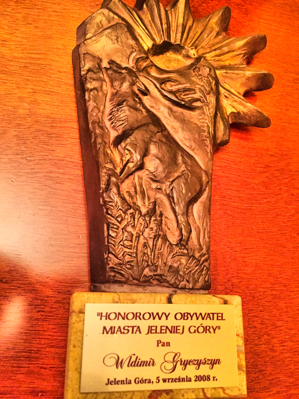 Зроблено з оригіналу в архіві власника.